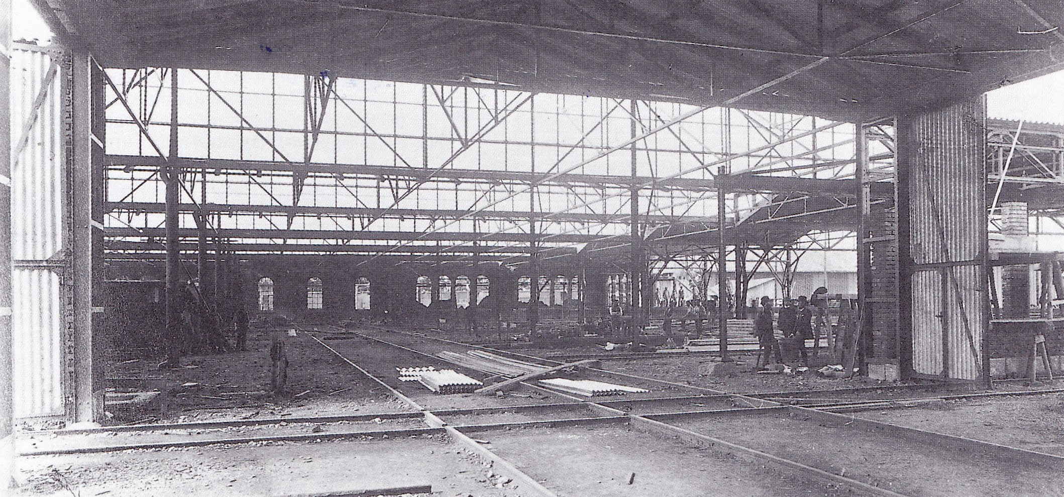 Wagenmontierungsgebäude in der Centralwerkstätte München am 8. Juni 1887